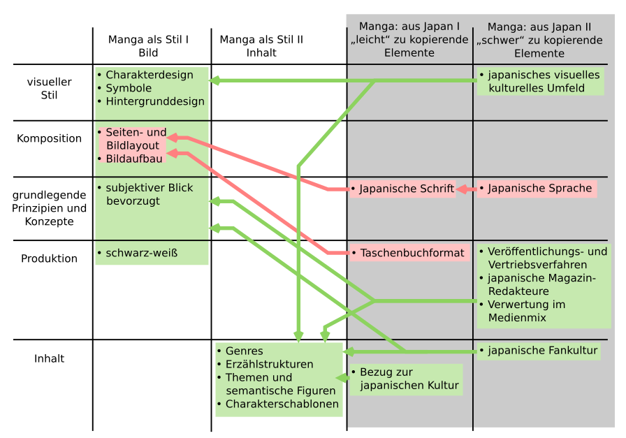 tabellarische Übersicht über Eigenschaften und mögliche Definitionsmerkmale von Manga nach Kacsuk, 2016